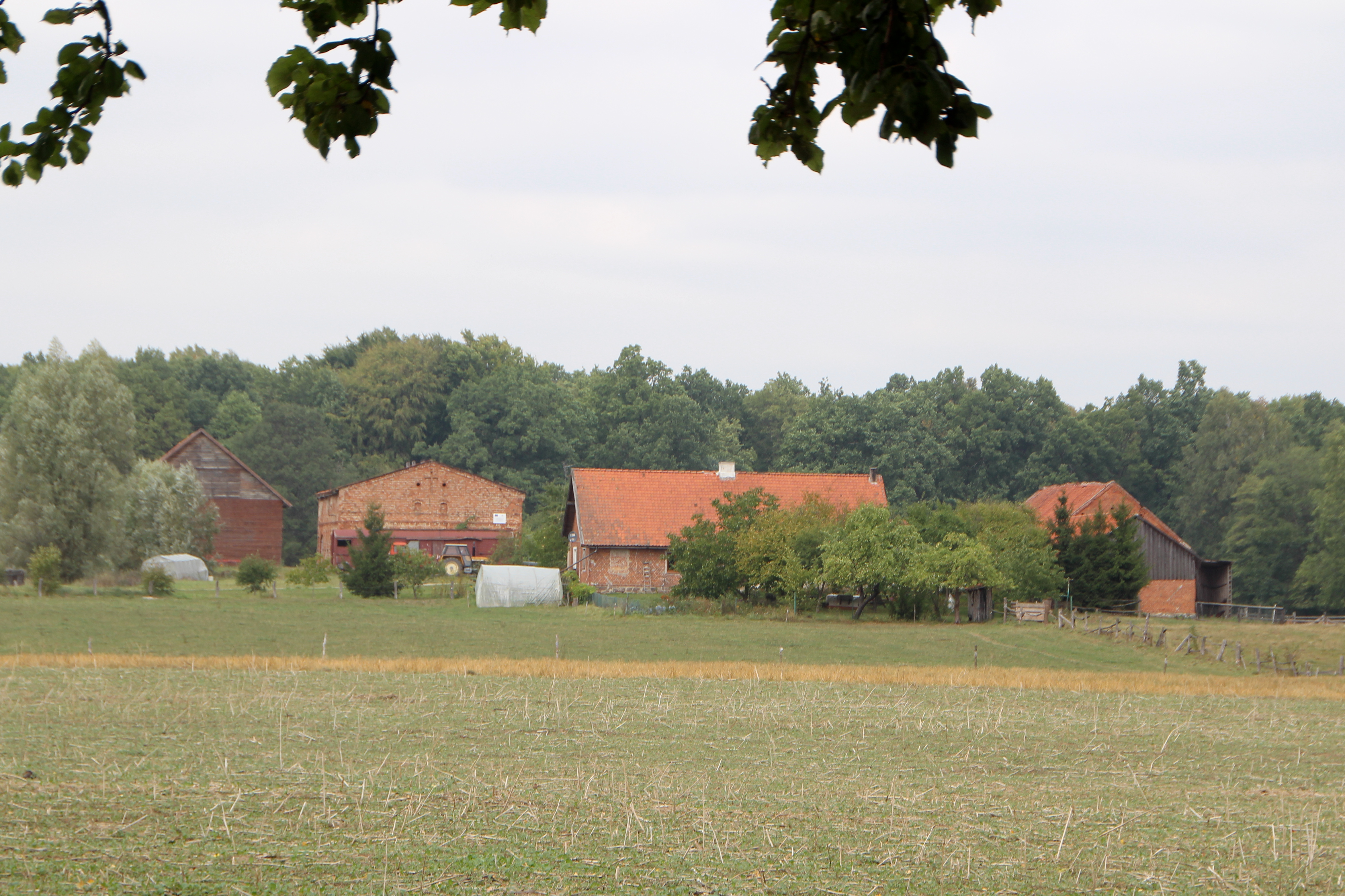 Dobrzykowo - wieś w Polsce położona w województwie warmińsko-mazurskim, w powiecie kętrzyńskim, w gminie Barciany.